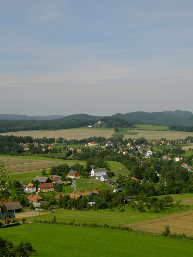 Blick von der Kaiserkrone auf Reinhardtsdorf-Schöna, die vorderen Häuser gehören zu Schöne, im Hintergrund ist Reinhardtsdorf mit dem Hotel auf dem Wolfsberg zu sehen